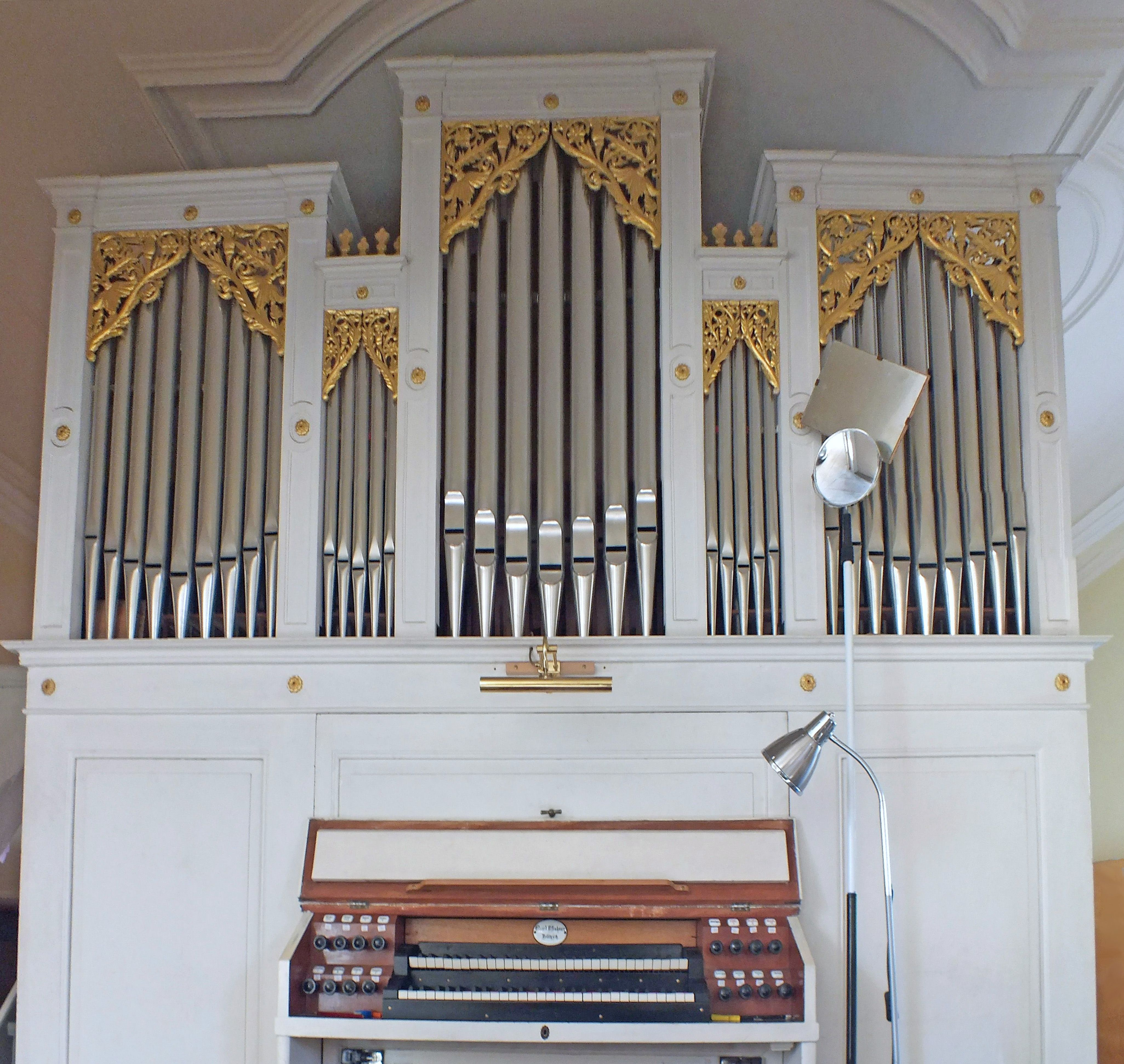 Orgel der Kirche St. Martin in Plaußig